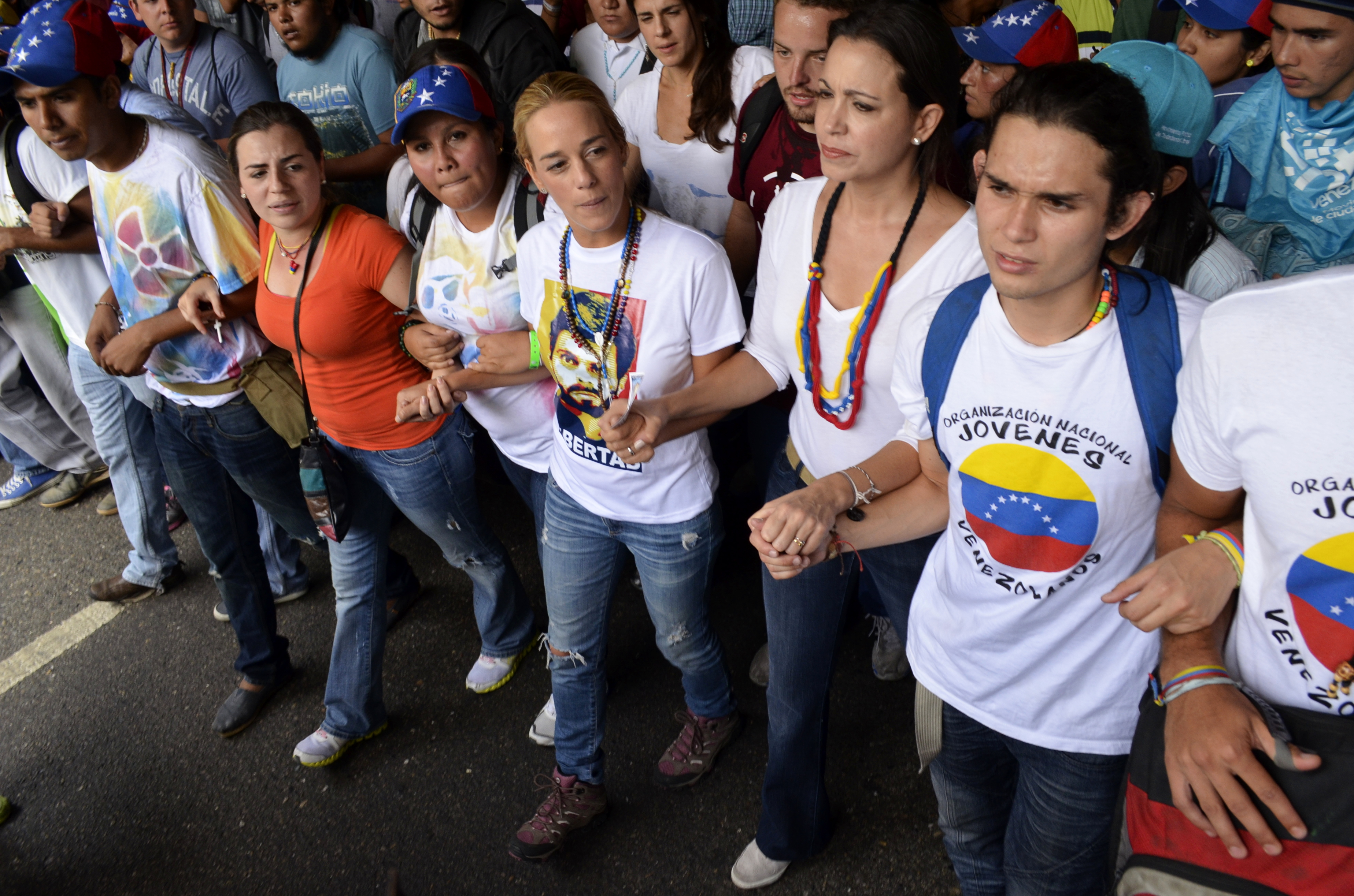 Marcha contra el adoctrinamiento estudiantil, Caracas 26Abr14